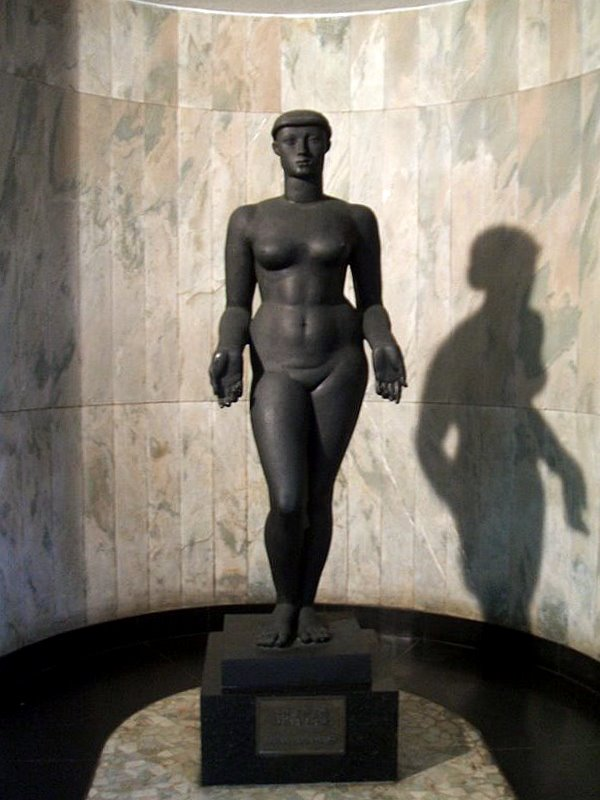 Victor Brecheret (1894-1955) - Graça, escultura em bronze, instalada na Galeria Prestes Maia (subterrâneo da Praça do Patriarca), São Paulo, Brasil